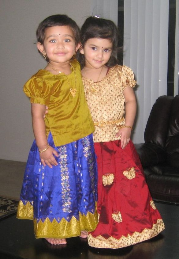 Two young girls in Langa Dhavani.